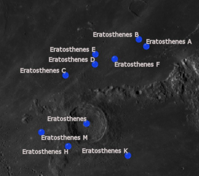 Cráter lunar Eratóstenes. Cráteres satélite. (Imagen LROC)